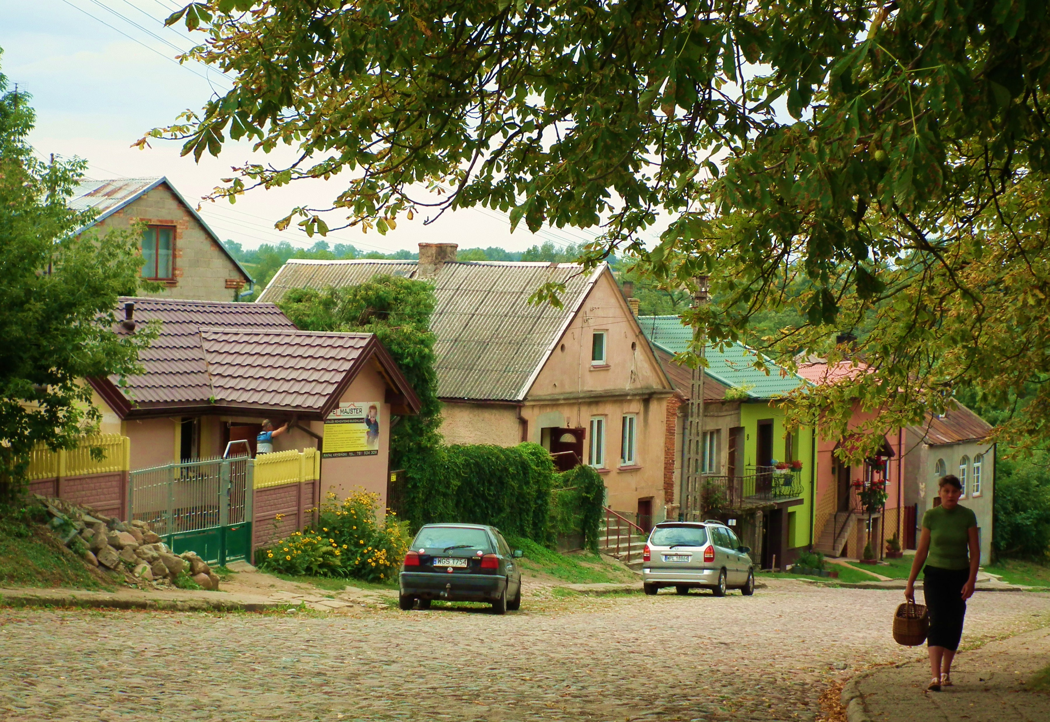 Pejzaż miejski z Bodzanowa.